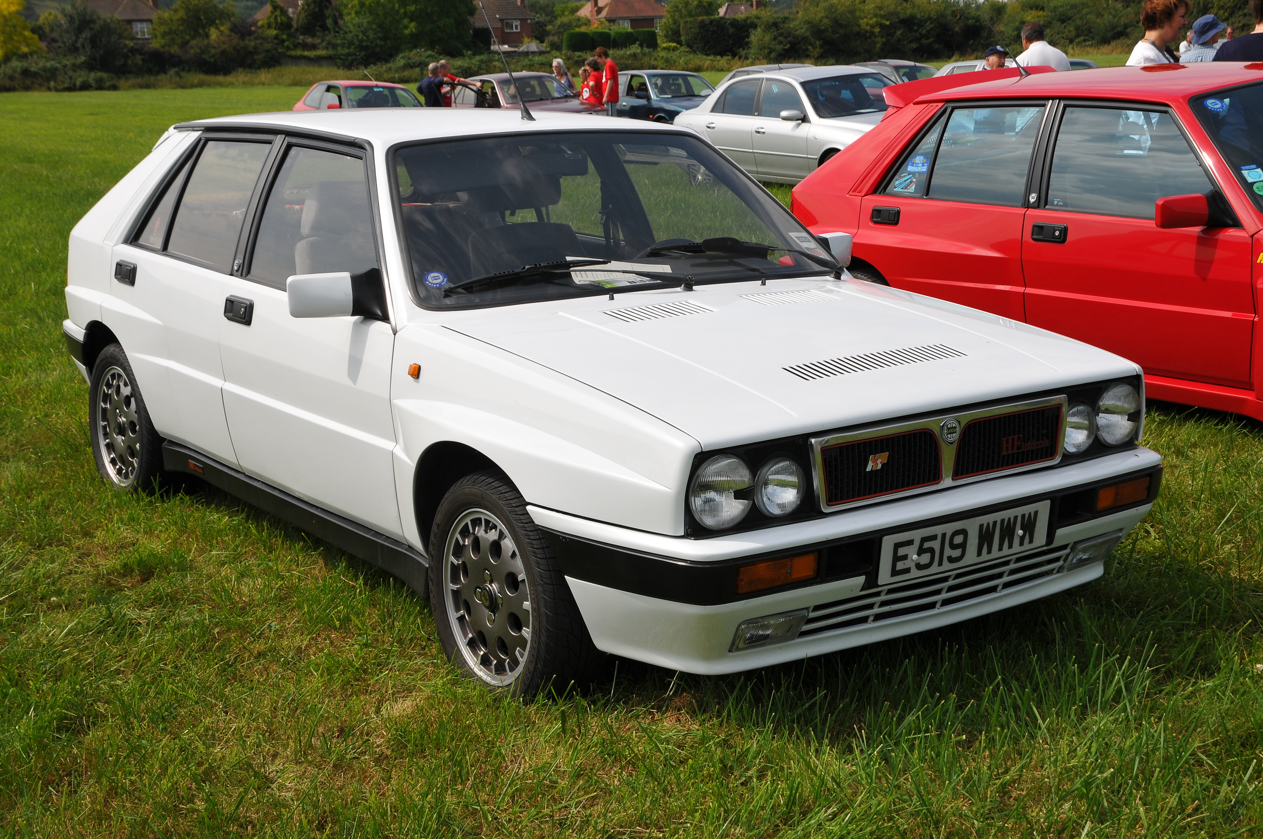 Lancia Motor Club AGM 2011